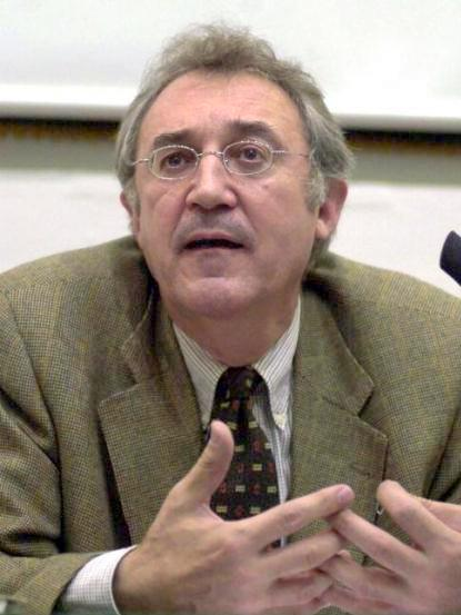 Luis López Guerra.